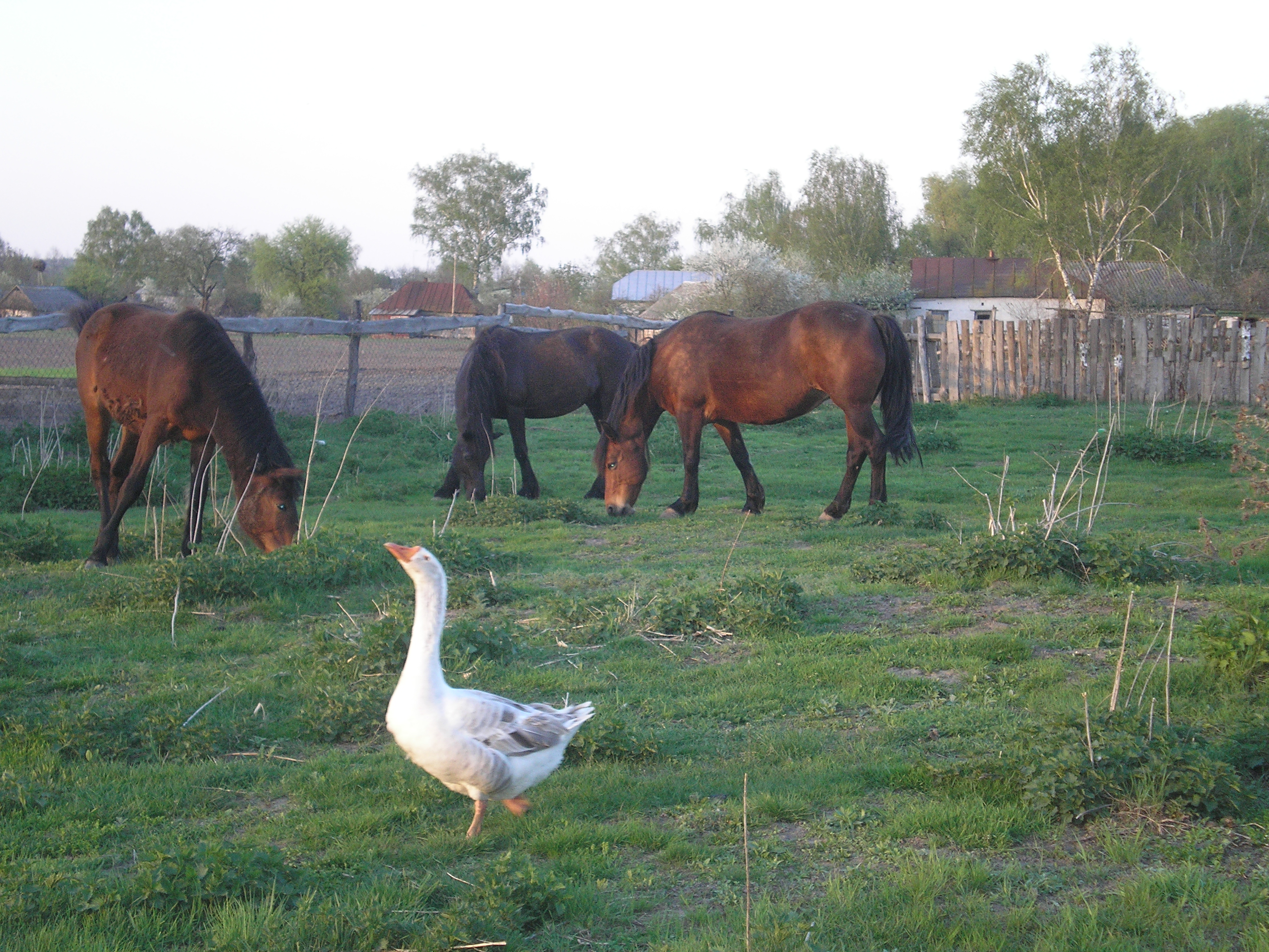 Коні в Конятині